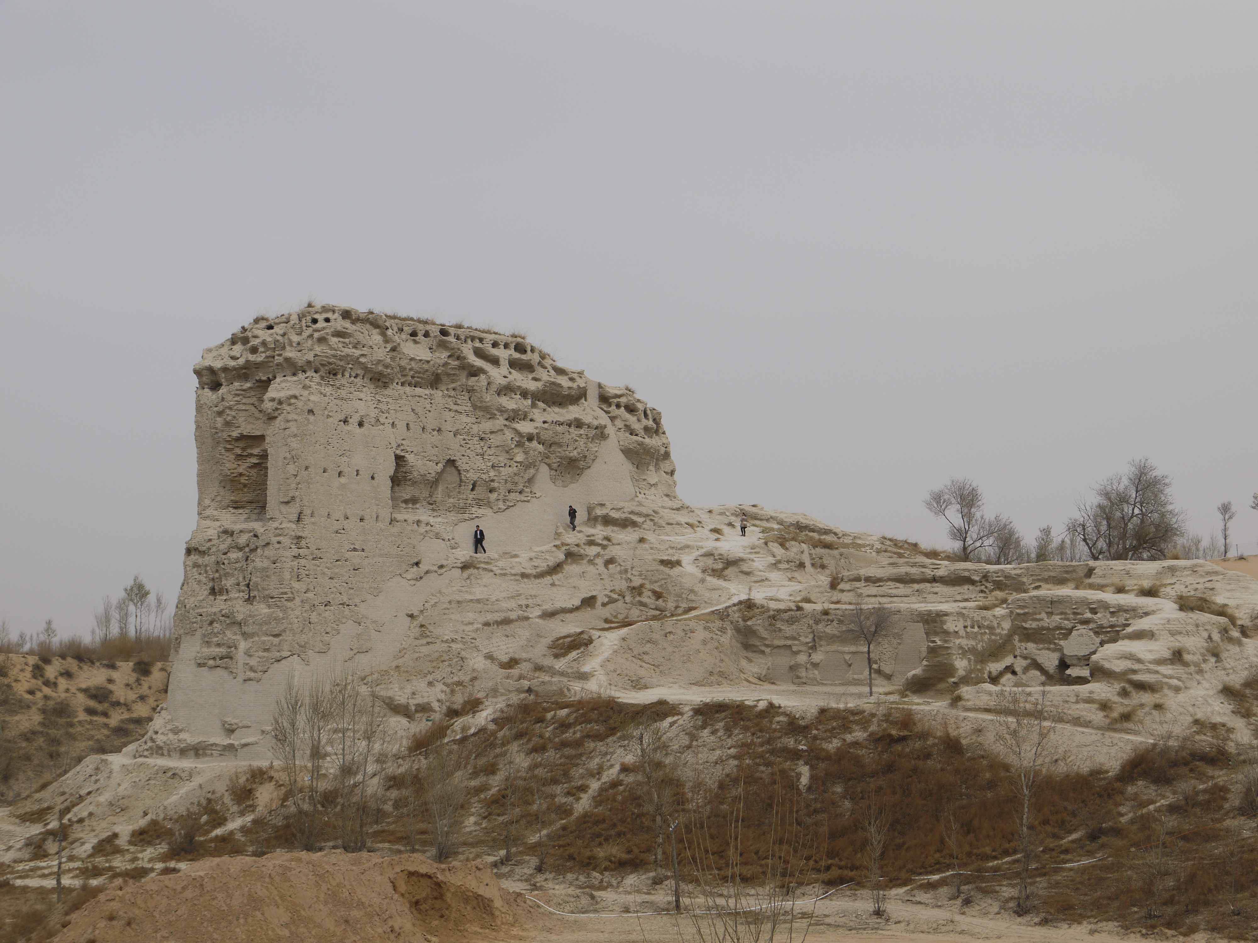 中文（中国大陆）: 统万城遗址